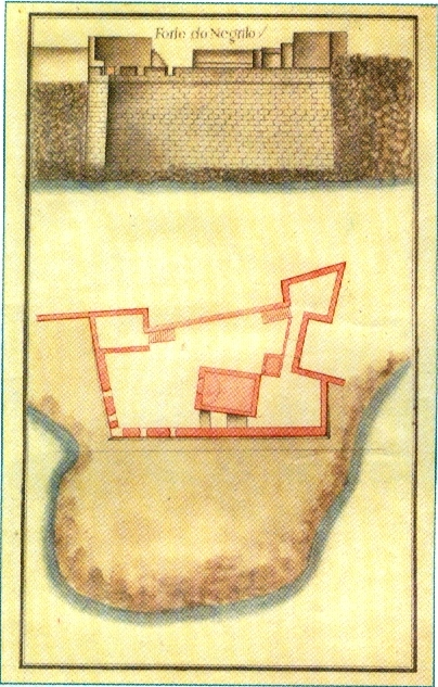 "Forte do Negrito", s/d, autor desconhecido, Arquivo Histórico Militar, Lisboa. in MARTINS, José Salgado, "Património Edificado da Ilha Terceira: o Passado e o Presente". Separata da "Atlântida", vol. LII, 2007. p. 15. Também integrante da prancha "Forte de S. Matheos; Forte do Negrito" (Fortes de São Mateus, ilha Terceira), Desenho aguarelado, 54 x 42 cm. in Colecção de Plantas e Alçados de 32 Fortalezas dos Açores, por Joze Rodrigo d'Almeida em 1830, José Rodrigo de Almeida, 1830 (c.) GEAEM (346-1-8A-96), Lisboa, Portugal.